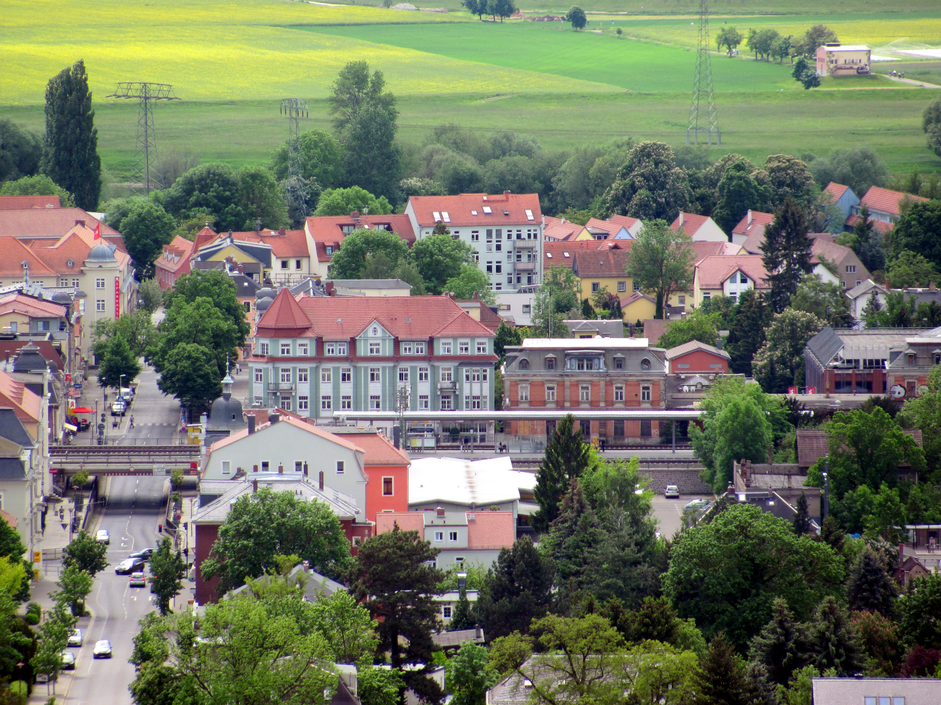 Radebeul Hp Kötzschenbroda, von Friedrich-August-Höhe aus. Neben Empfangsgebäude ist das Wohn- und Geschäftshaus Paul Pönitz zu sehen. Dazu Kreuzung Meißner Straße mit Moritzburger und Bahnhofstraße. Oben links im Anschnitt: Sparkasse Kötzschenbroda